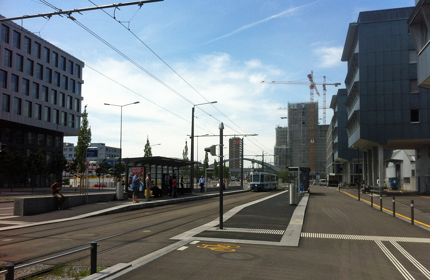 Zürich, Pfingstweidstrasse mit Tram 2000 – Blick nach Westen bei der Haltestelle Technopark